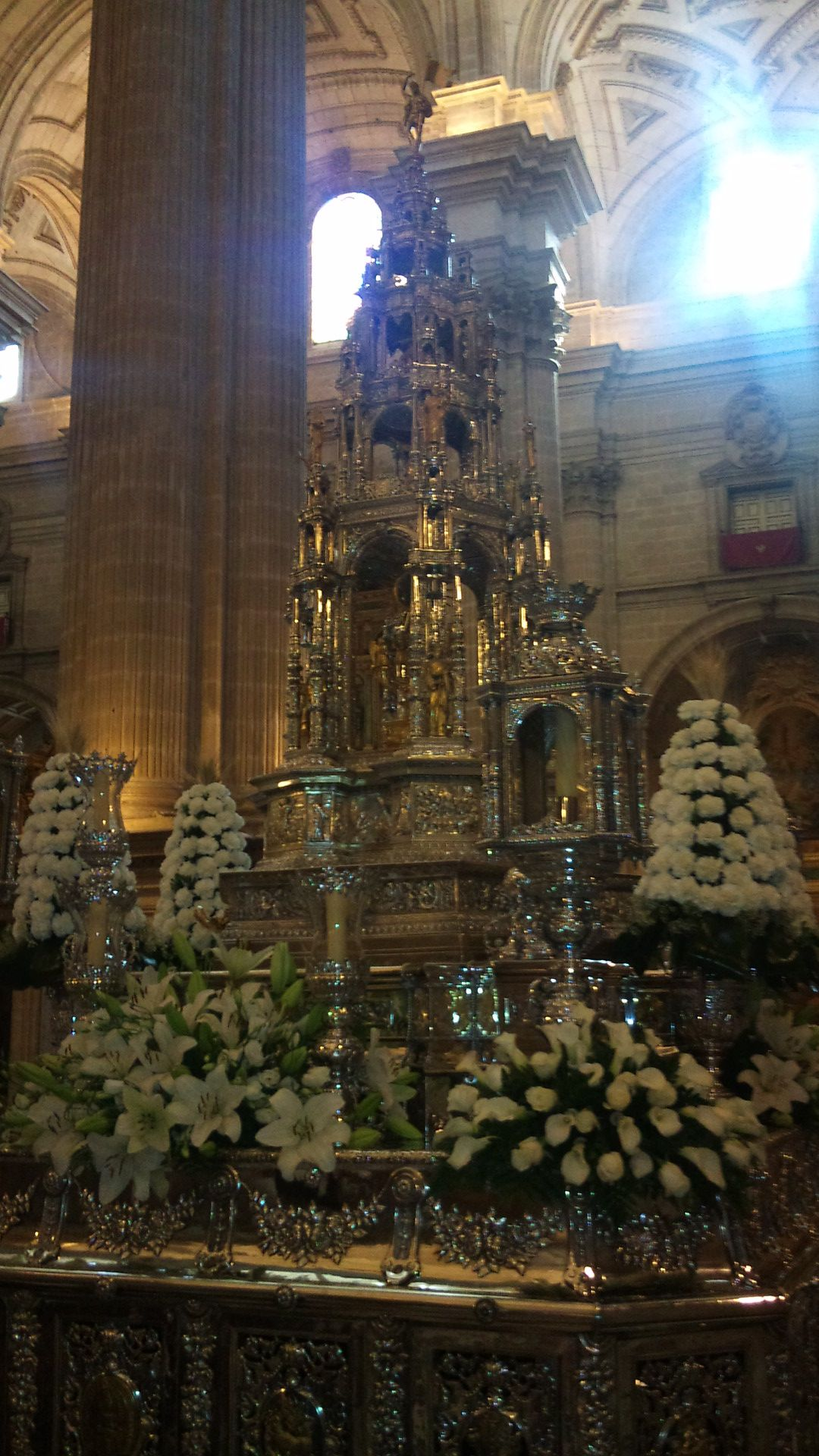 Custodia de la catedral de Jaén preparada para su salida procesional el día del Corpus de 2012.